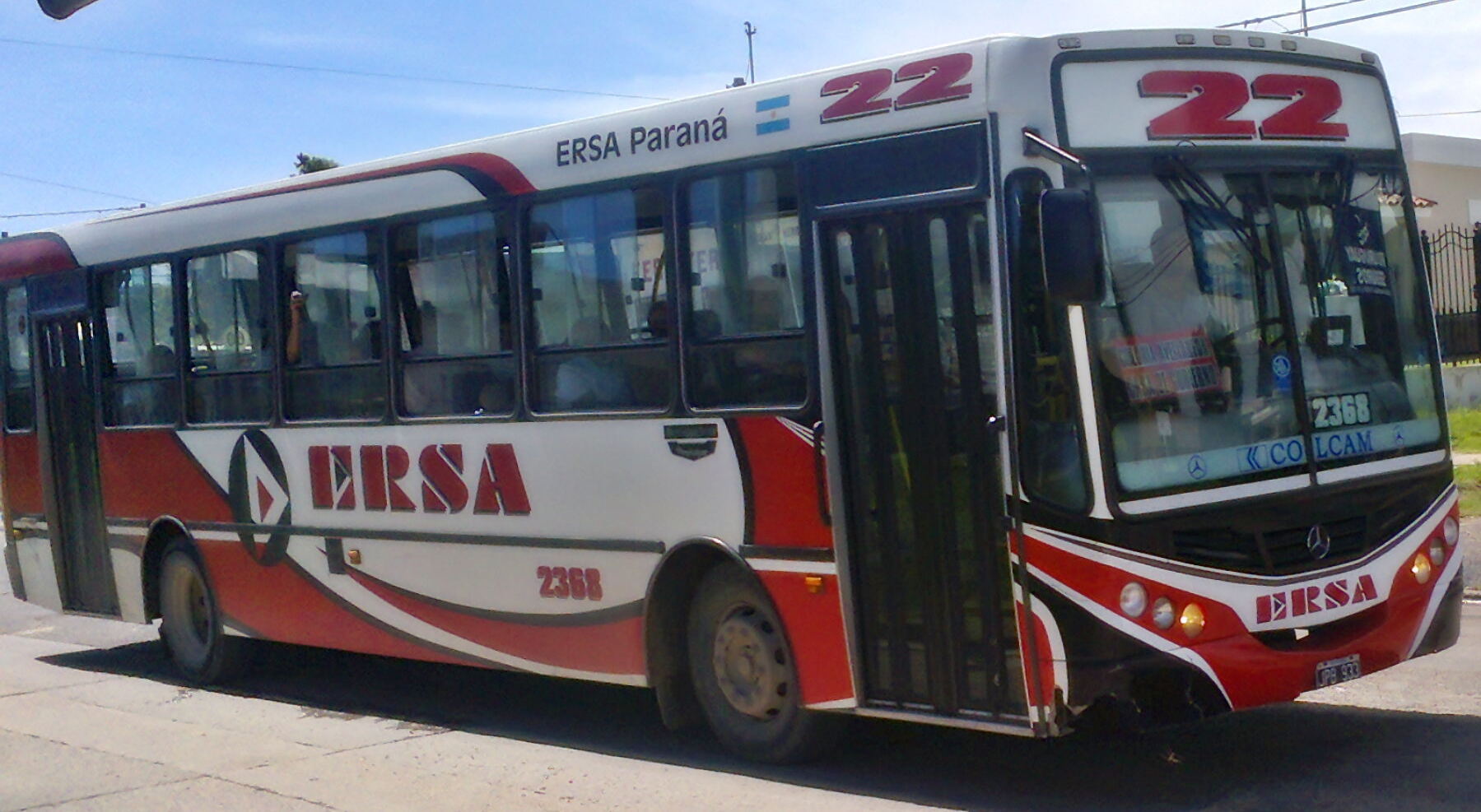 Colectivo Línea 22, interno 2368, impresa ERSA Urbano, matrícula JPB933, motor Mercedes Benz, carrocería Metalpar Tronador II. Paraná, Entre Ríos, Argentina. ColectivosEntreRios.